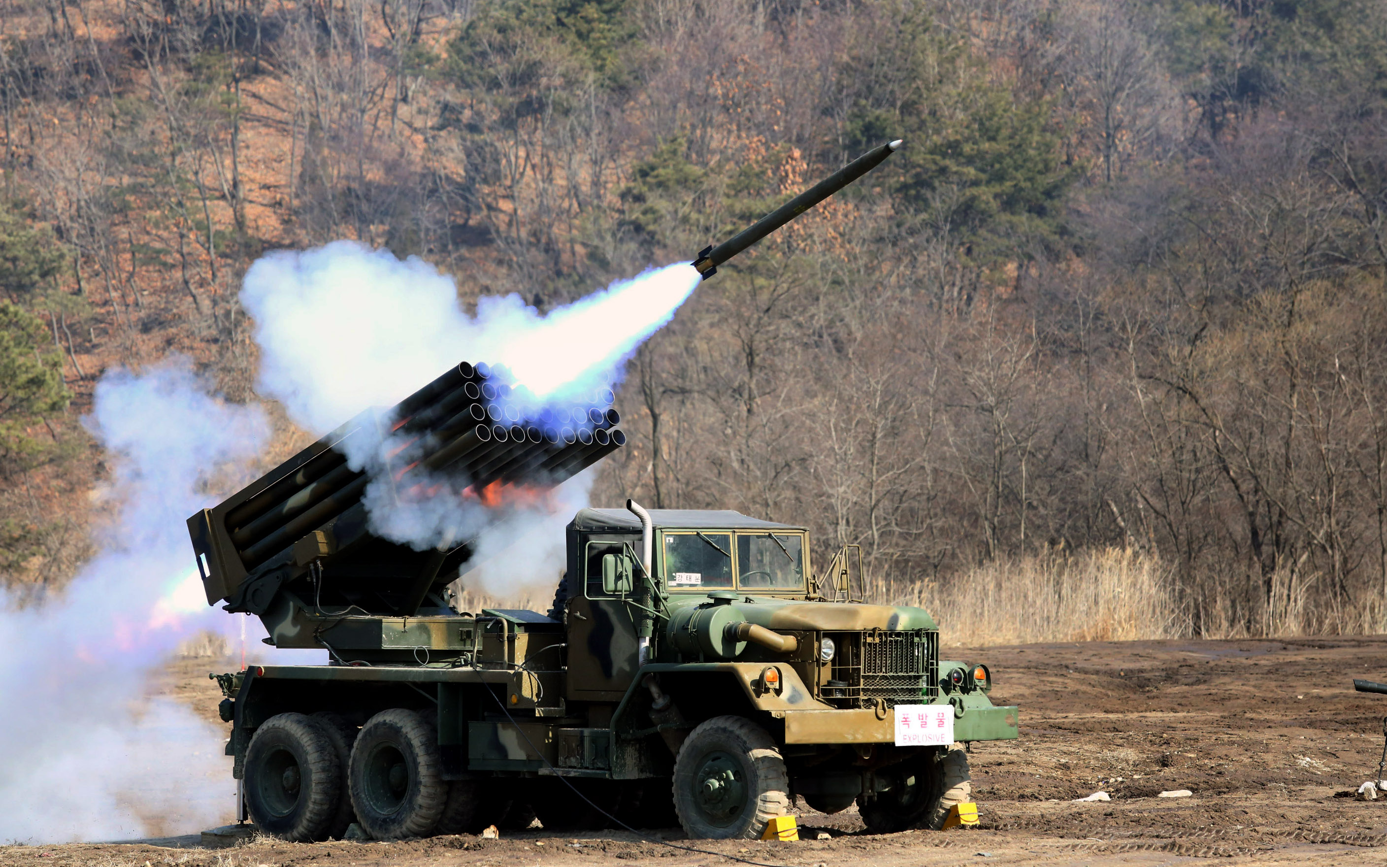 육군 5 포병여단 구룡대대가 지난 24일 K-136 130mm 다련장로켓 사격훈련을 실시하고 있다. ※ 21일 촬영한 사진을 자료로 활용하였습니다.